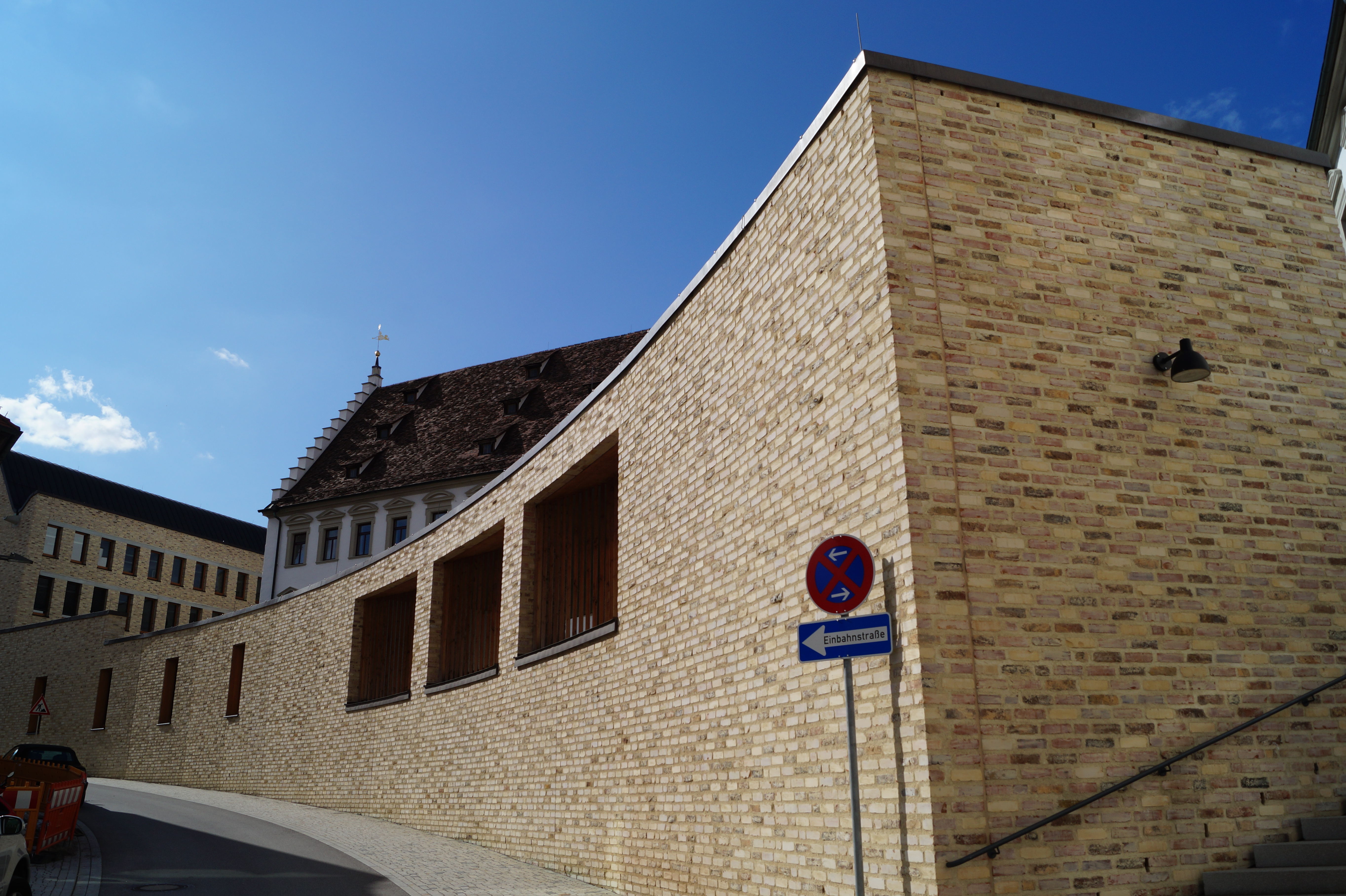 Bischöfliches Ordinariat der Diözese Rottenburg-Stuttgart